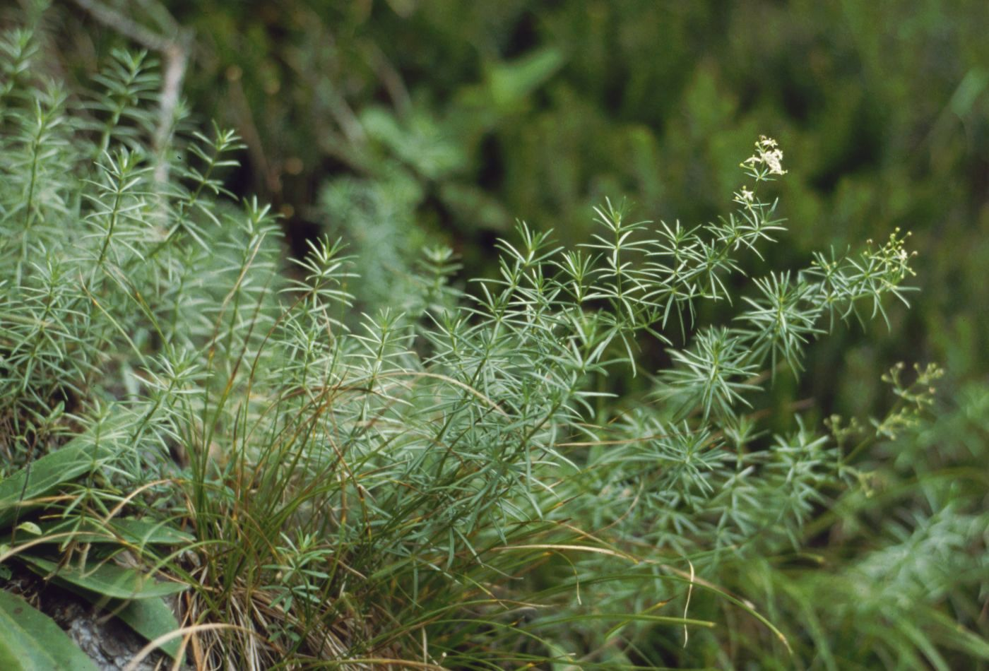 Glanz-Labkraut (Galium lucidum), Kaffeegewächse (Rubiaceae) – Österreich/Austria/Autriche: Tirol, Fernpass, Passhöhe